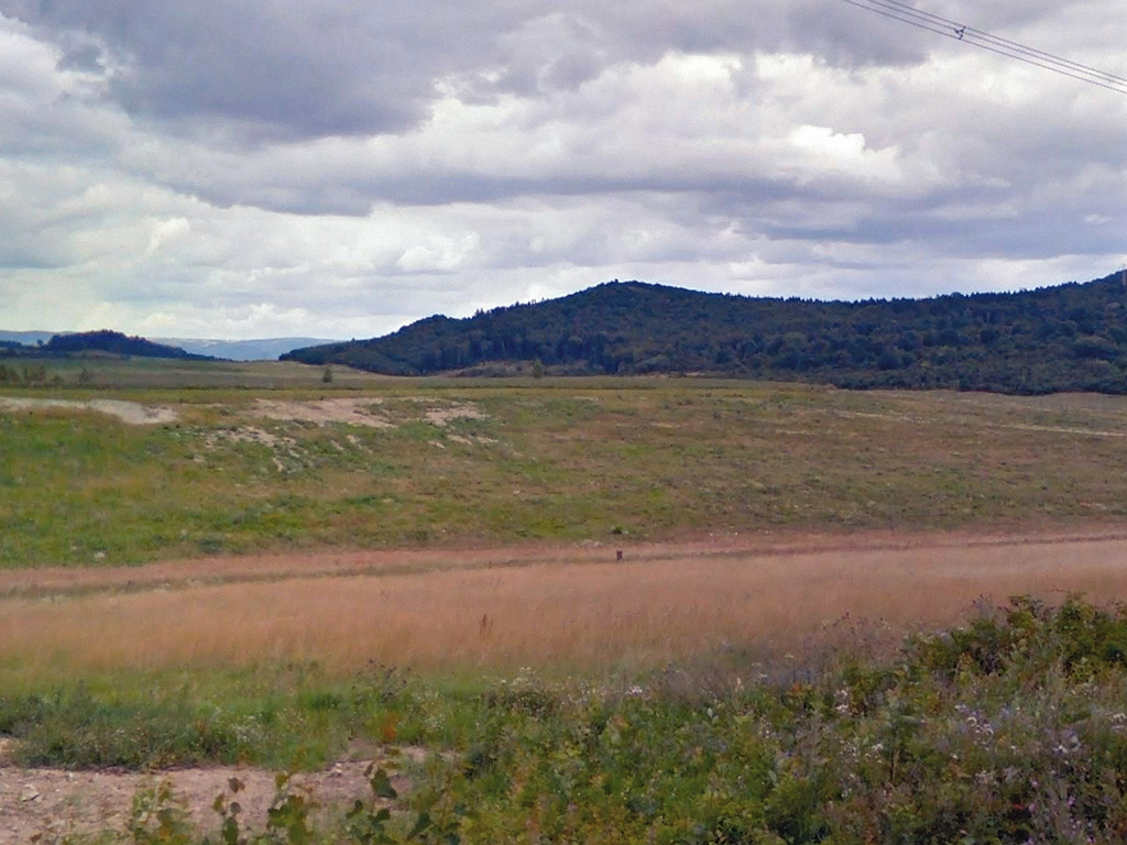 Vrch Chlomek u Kostomlat pod Milešovkou